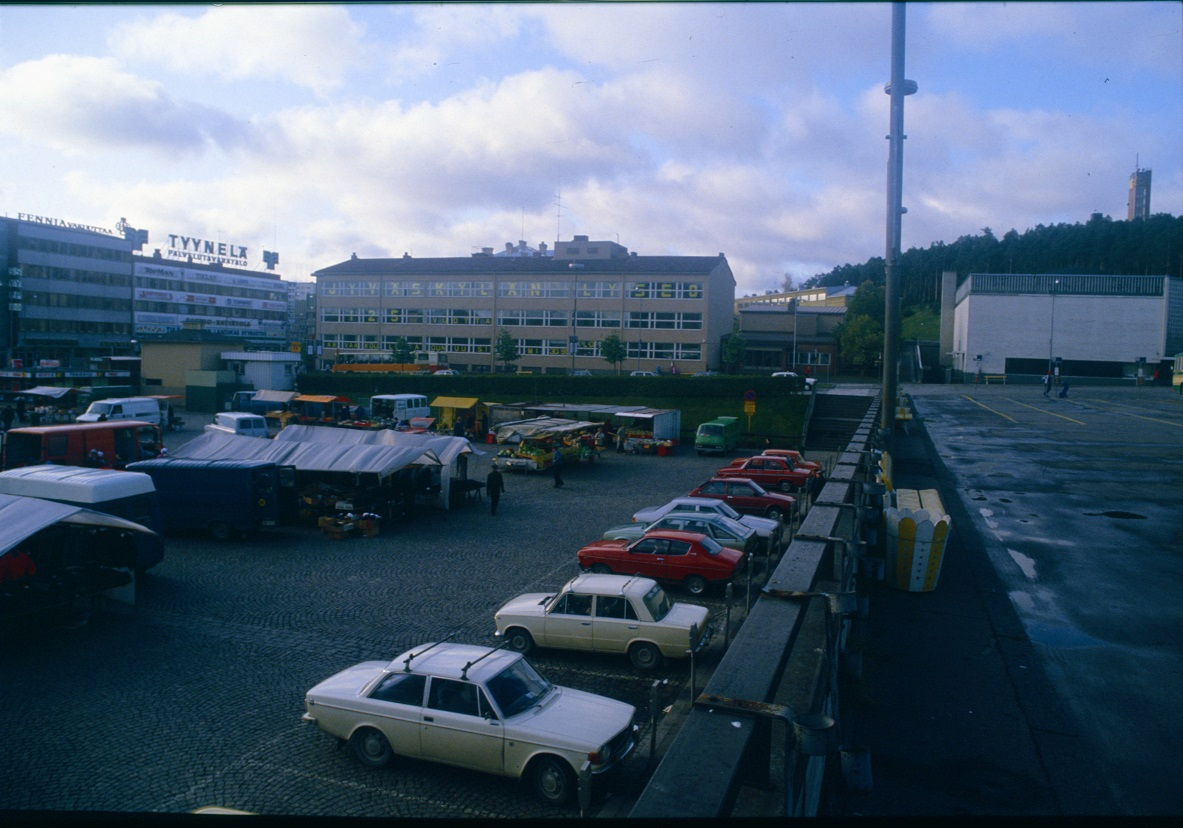 Jyväskylän tori, Jyväskylän Lyseo ja Siiontemppeli syksyllä 1983. Lyseon ikkunoissa teksti Jyväskylän Lyseo 125.